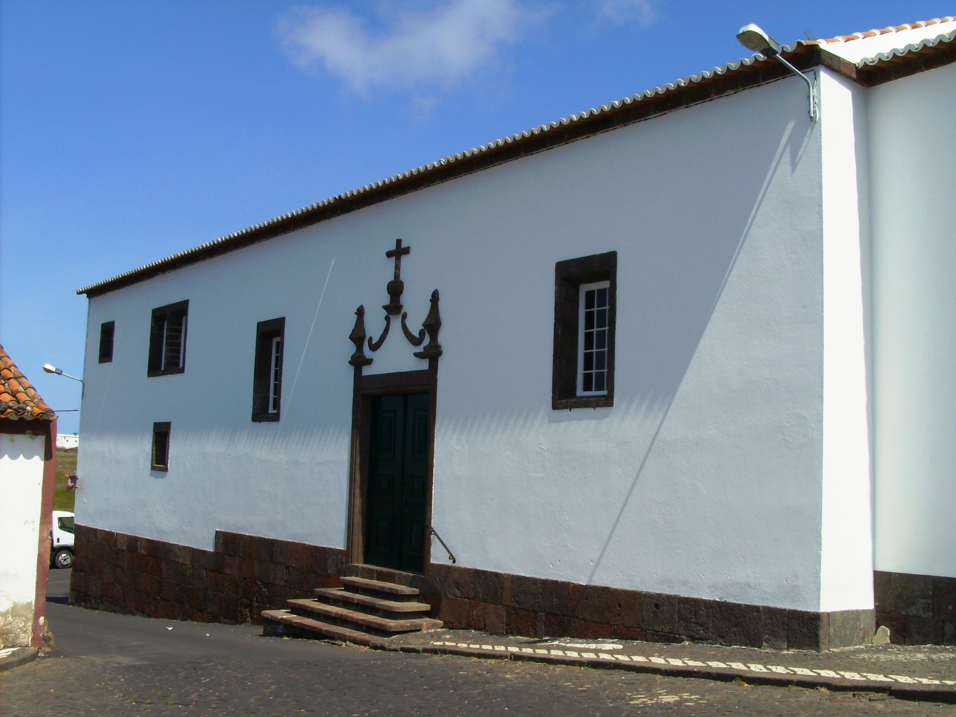 Igreja do Recohimento de Santa Maria Madalena, Vila do Porto, ilha de Santa Maria, Açores.